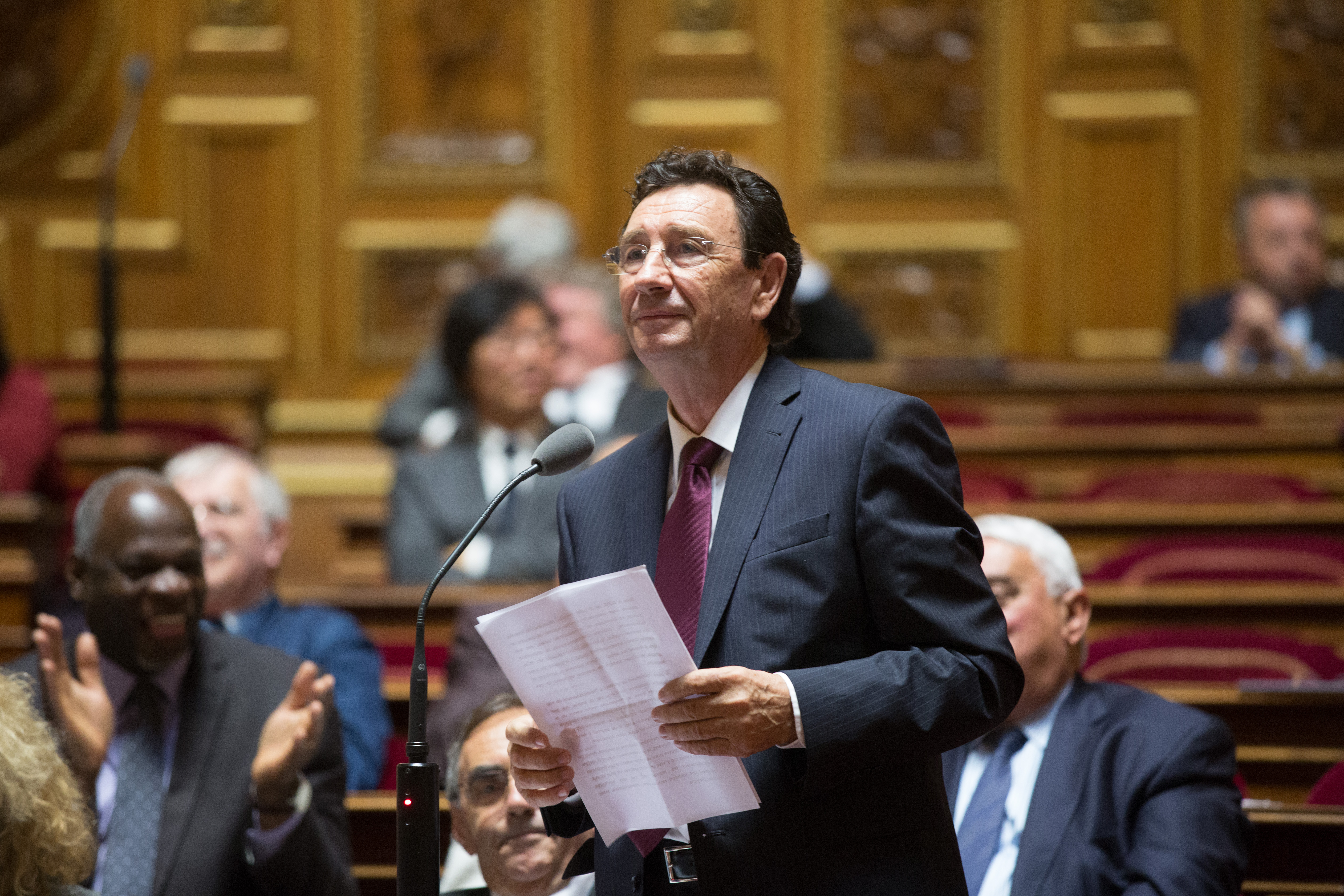 Raymond Vall au Sénat